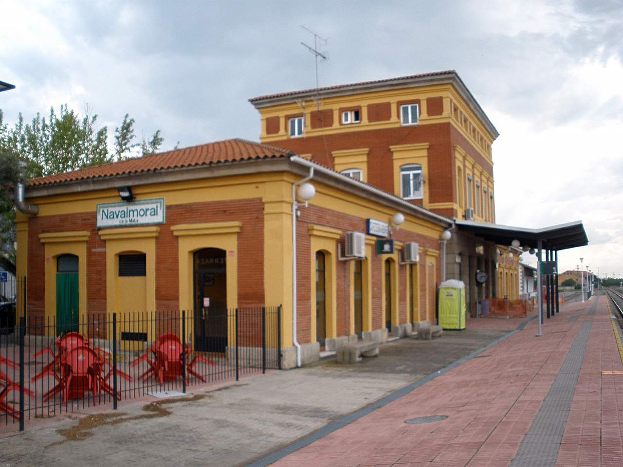 Estación de tren de Navalmoral de la Mata (Cáceres)